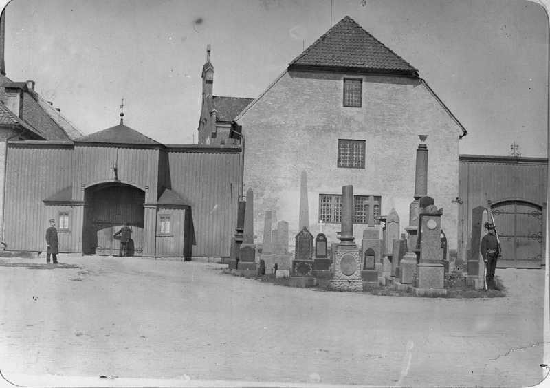 Akershus festning, Slaveriet, fengsel, port, gravmonumenter, soldat, menn.